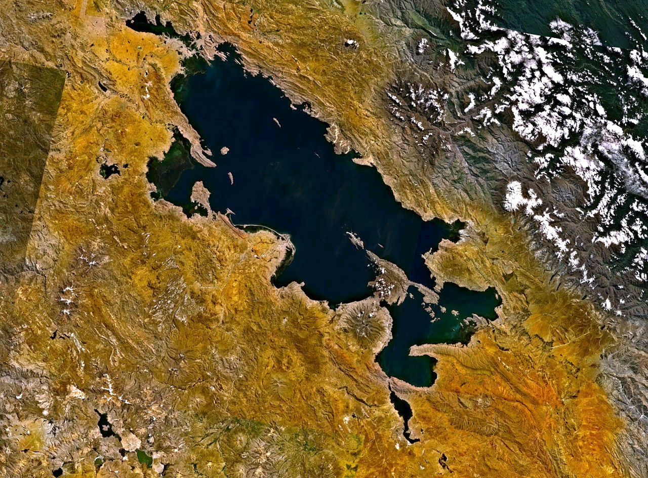 Satellitenaufnahme des Titicaca Sees in Bolivien.